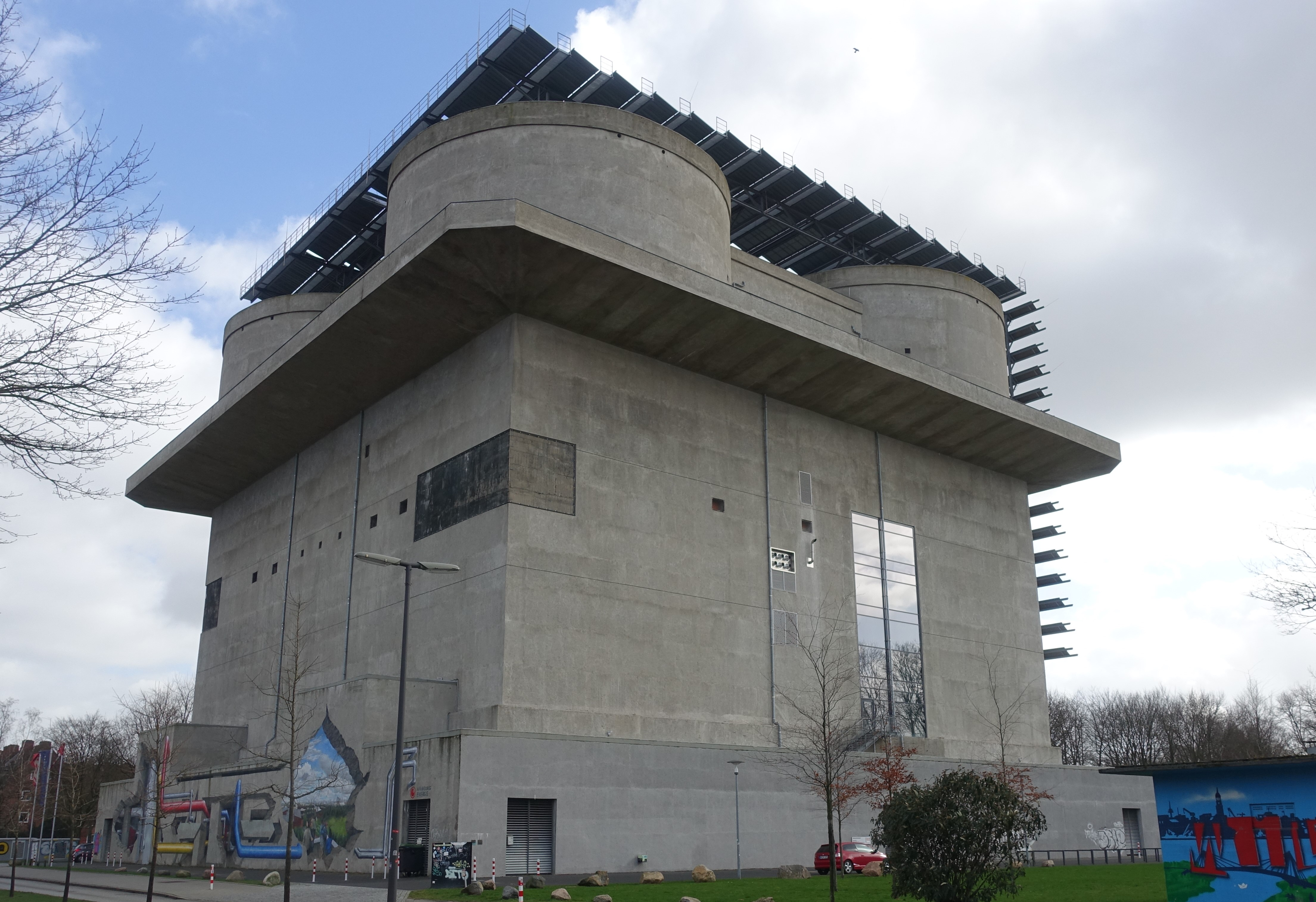 Der ehemalige Flakbunker Wilhelmsburg ist im Rahmen der IBA zum Energiebunker umgebaut worden